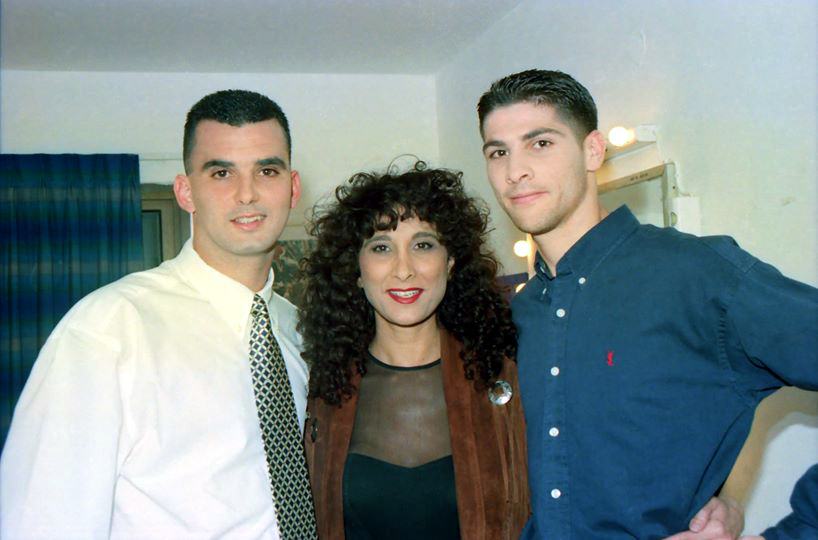 אביבה אבידן אוהדת כדור רגל מושבעת בחברת אלון חזן ואבי נמני